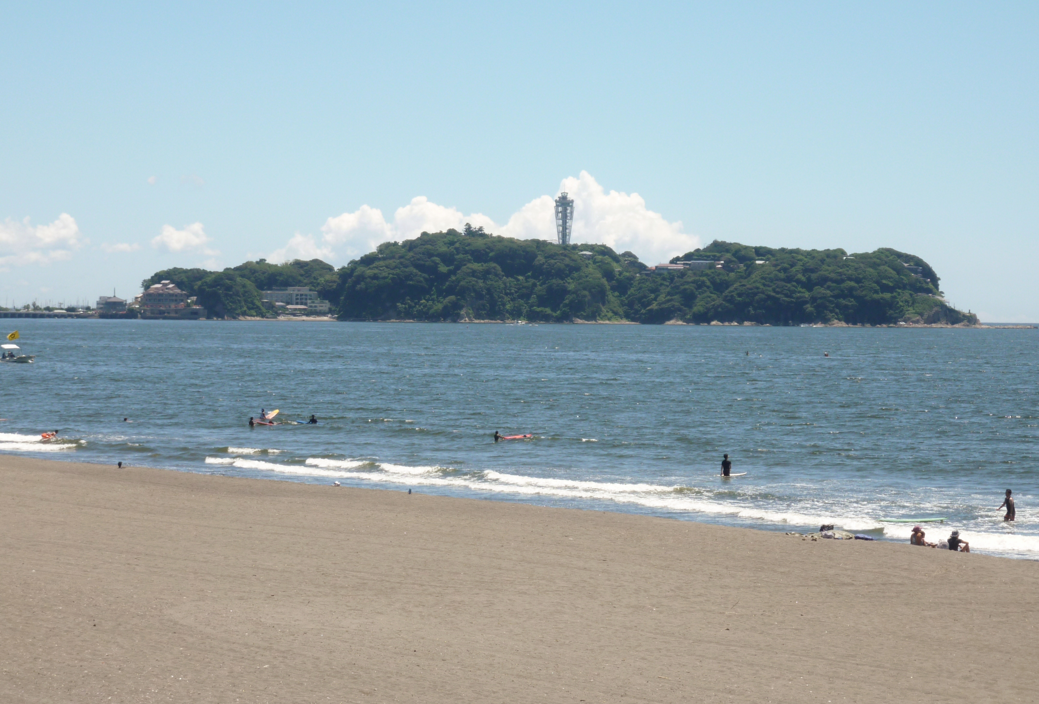 鵠沼海岸から見た江の島（神奈川県藤沢市）